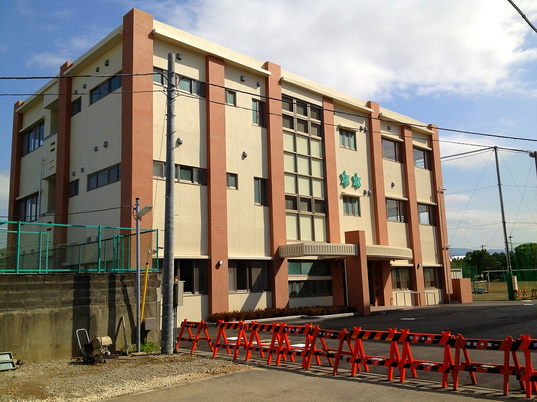 沼津市立沼津高等学校求道館（建築名称：生活館）南面を南西→北東の向きで見たもの。平成24年3月20日撮影。なおこの日時点ではまだ工事中であり供用を開始していない。